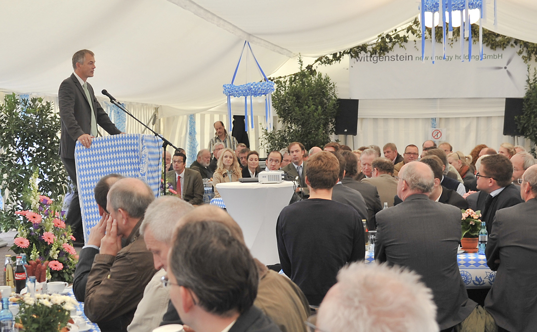 15. Station seiner Zukunftsenergientour: Windpark-Eröffnung in Bad Laasphe Auf der 15. Station seiner Zukunftsenergientour eröffnete NRW-Klimaschutzminister Johannes Remmel heute (11. September 2013) mit einer Delegation der EnergieAgentur.NRW einen Windpark in Bad Laasphe, der im Privatwald von Ludwig Prinz zu Sayn-Wittgenstein-Berleburg entsteht. Die sechs Windkraftanlagen mit einer Leistung von insgesamt 18 MW wurden von der wittgenstein new energy holding GmbH finanziert, geplant und umgesetzt. Der Park könnte den jährlichen Strombedarf der Stadt Bad Laasphe (14.000 Einwohner) vollständig decken.Das Beispiel zeigt: Moderne Windenergieanlagen können wirtschaftlich in Wäldern betrieben werden, weil sie mit einer Nabenhöhe von 140 Metern die windreichen und turbulenzarmen Zonen über den Wipfeln technisch nutzbar machen. Flickr tags: NRW; Klimaschutz-Minister Johannes Remmel; 2013; Klimaschutztour; Bad Laasphe; wittgenstein new energy holding GmbH; Windkraft; Windpark; erneuerbare Energien